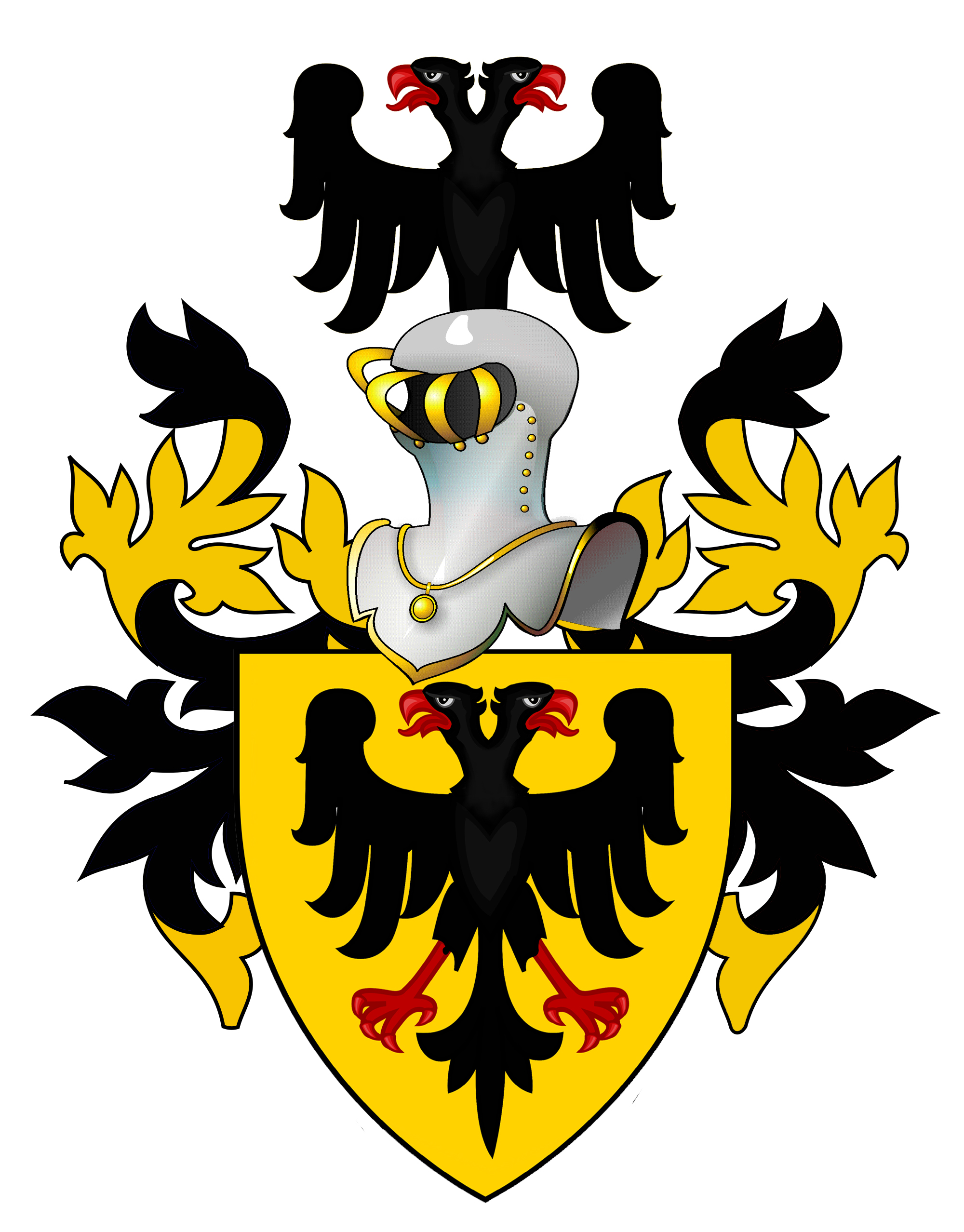 Balogh Nagycímer